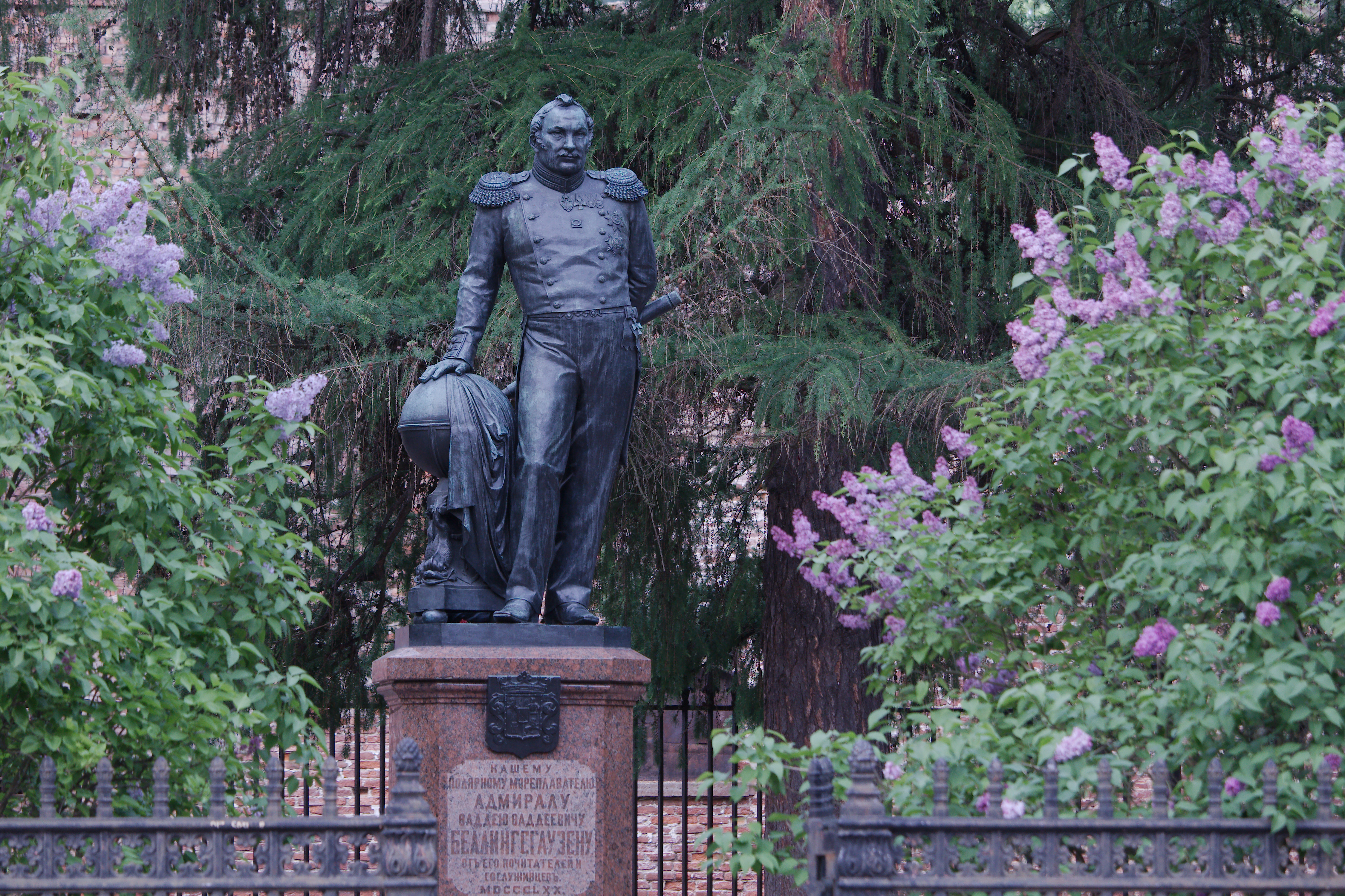 Памятник мореплавателю Ф.Ф. Беллинсгаузену: Советская улица, Екатерининский парк, Кронштадт, Кронштадтский район, Санкт-Петербург